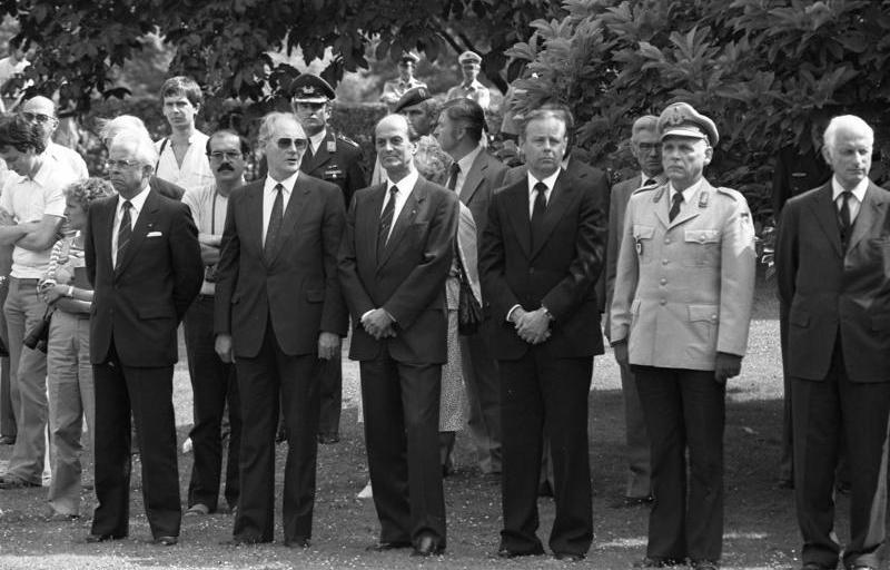 20.7.1983 Kranzniederlegung zum Gedenken des 20. Juli 1944 am Ehrenmal im Bonner Stadtgarten, durchgeführt vom Zentralverband Demokratischer Widerstandskämpfer und Verfolgtenorganisationen.